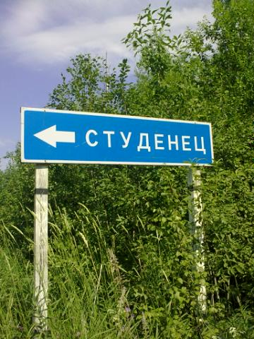 Студенецкая отворотка, до посёлка примерно 4 км.